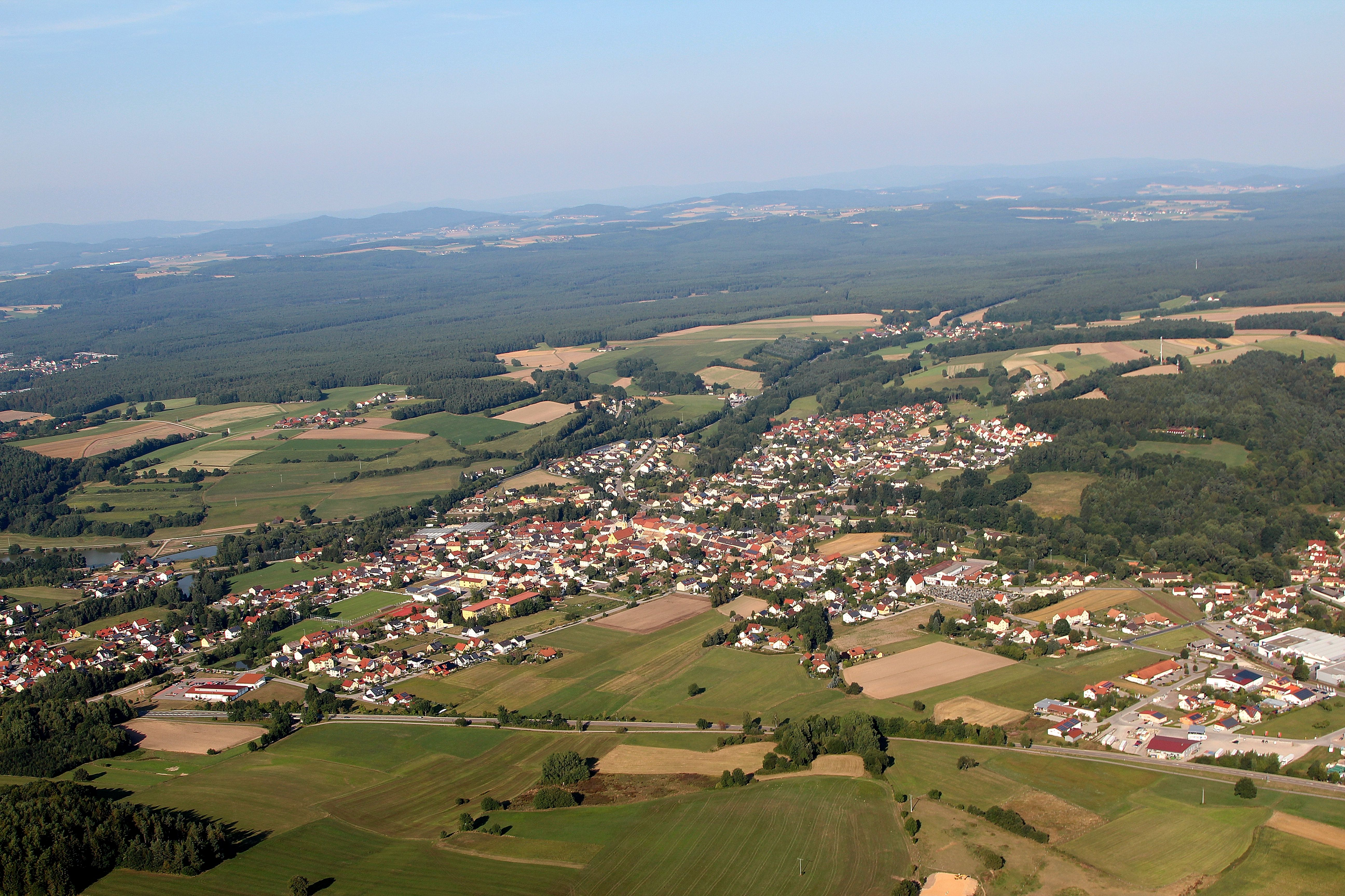 Bruck, Landkreis Schwandorf, Oberpfalz, Bayern